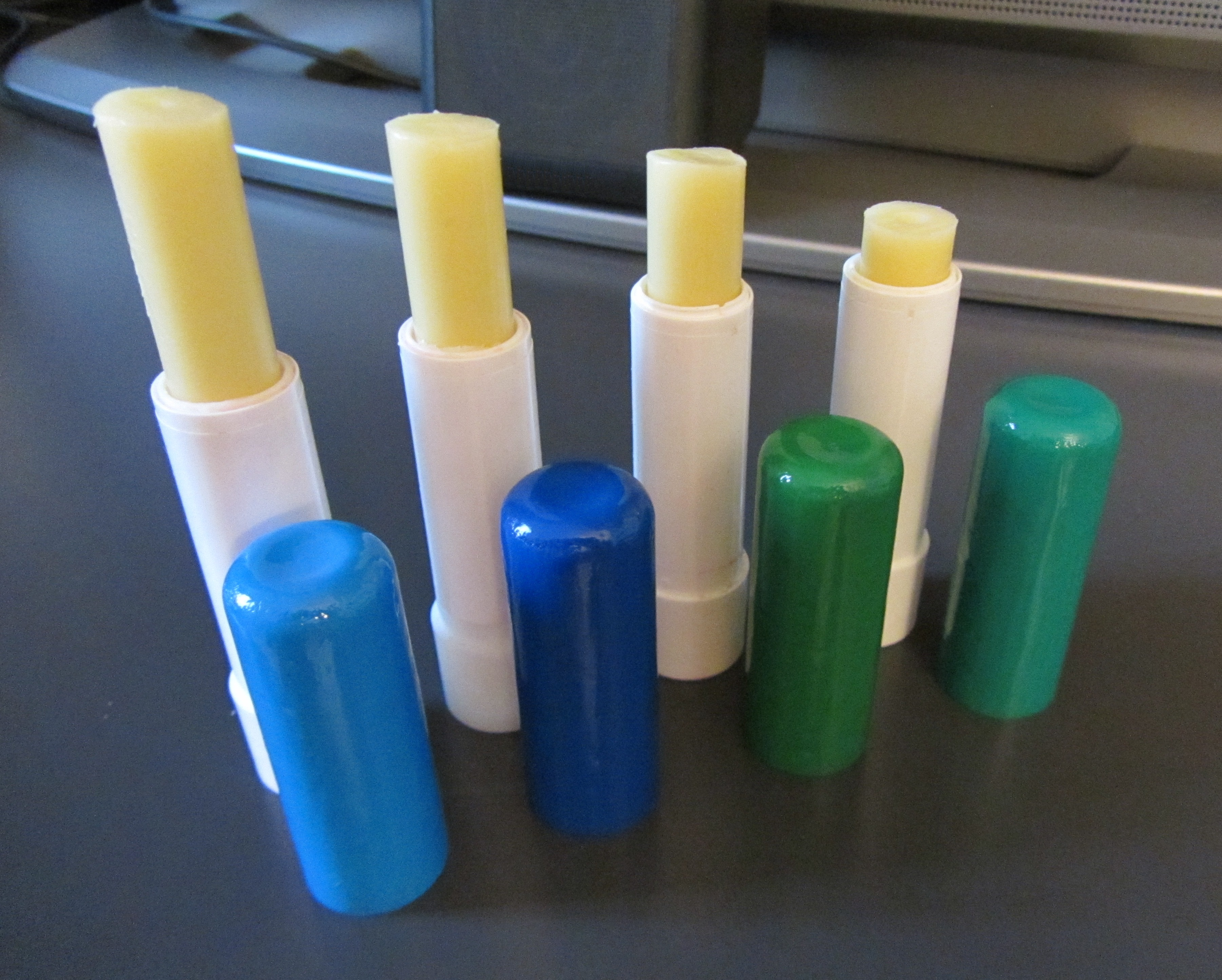 Burricacao artigianali (fatti in casa) con ingredienti biologici, a base di burro di cacao, olio di ricino e cera d'api, con tintura di calendula e olio essenziale di mandarino.